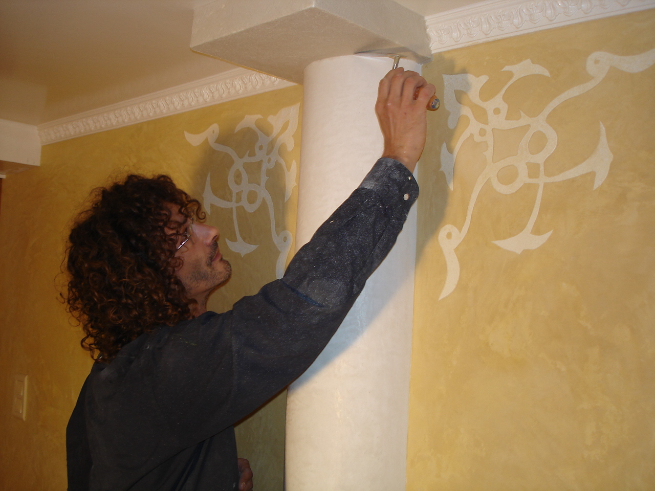 Décor Romain, stuc avec incrustation de sgraffito, Stéphane Baron.fr/